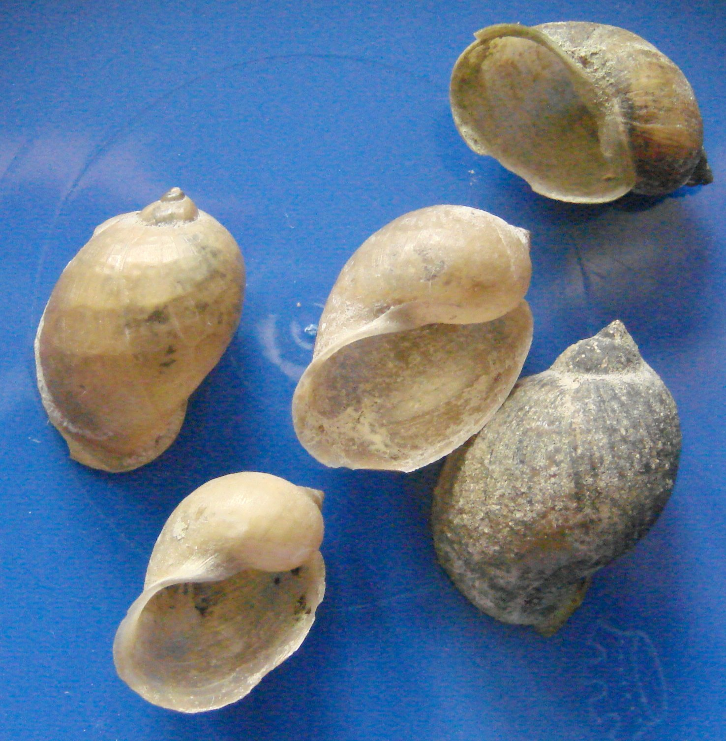 Limnaea peregra var. ovata